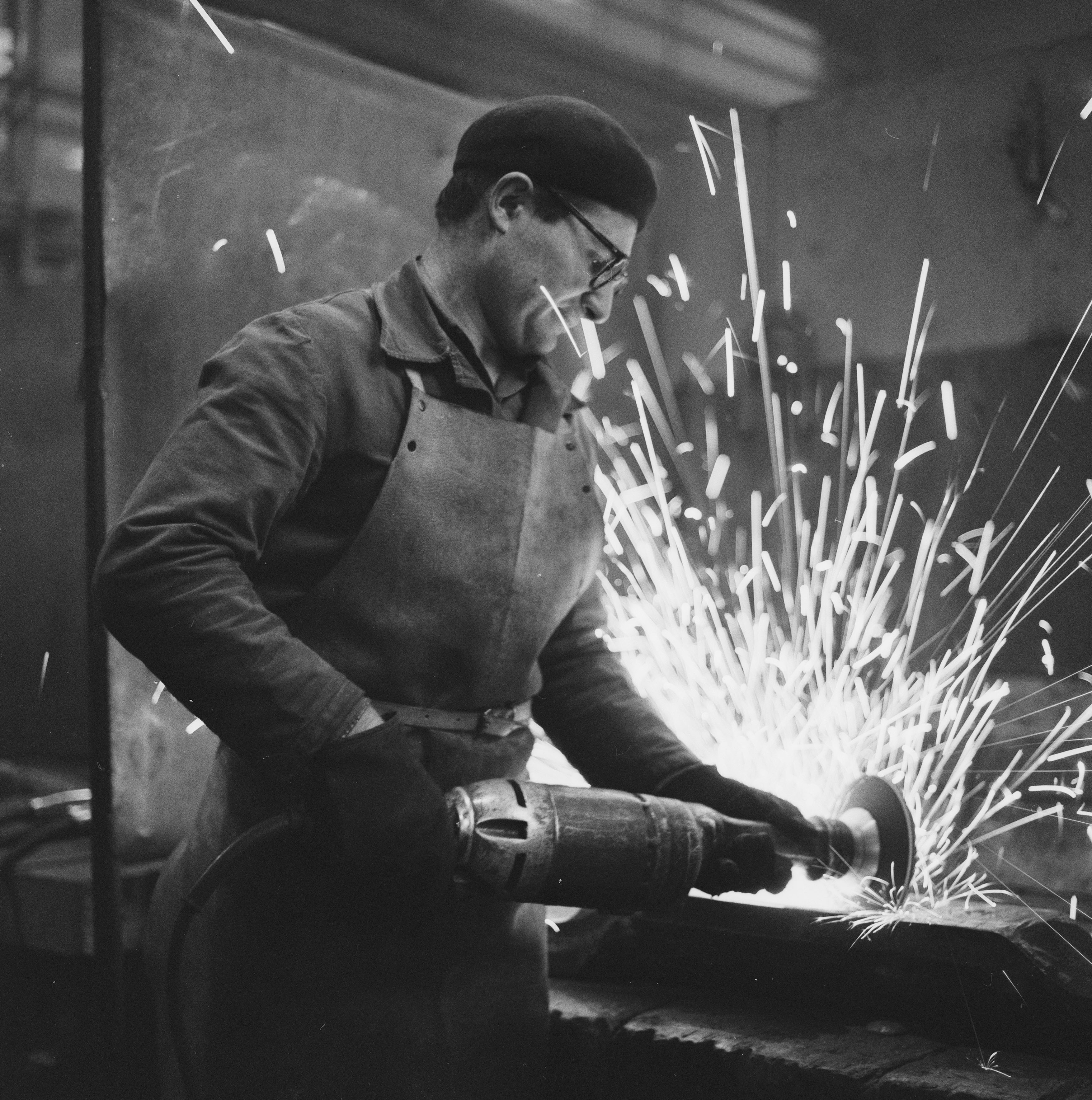 Reportage: Mensch und Arbeit in der Stahlgiesserei der Georg Fischer AG in Schaffhausen, 1964